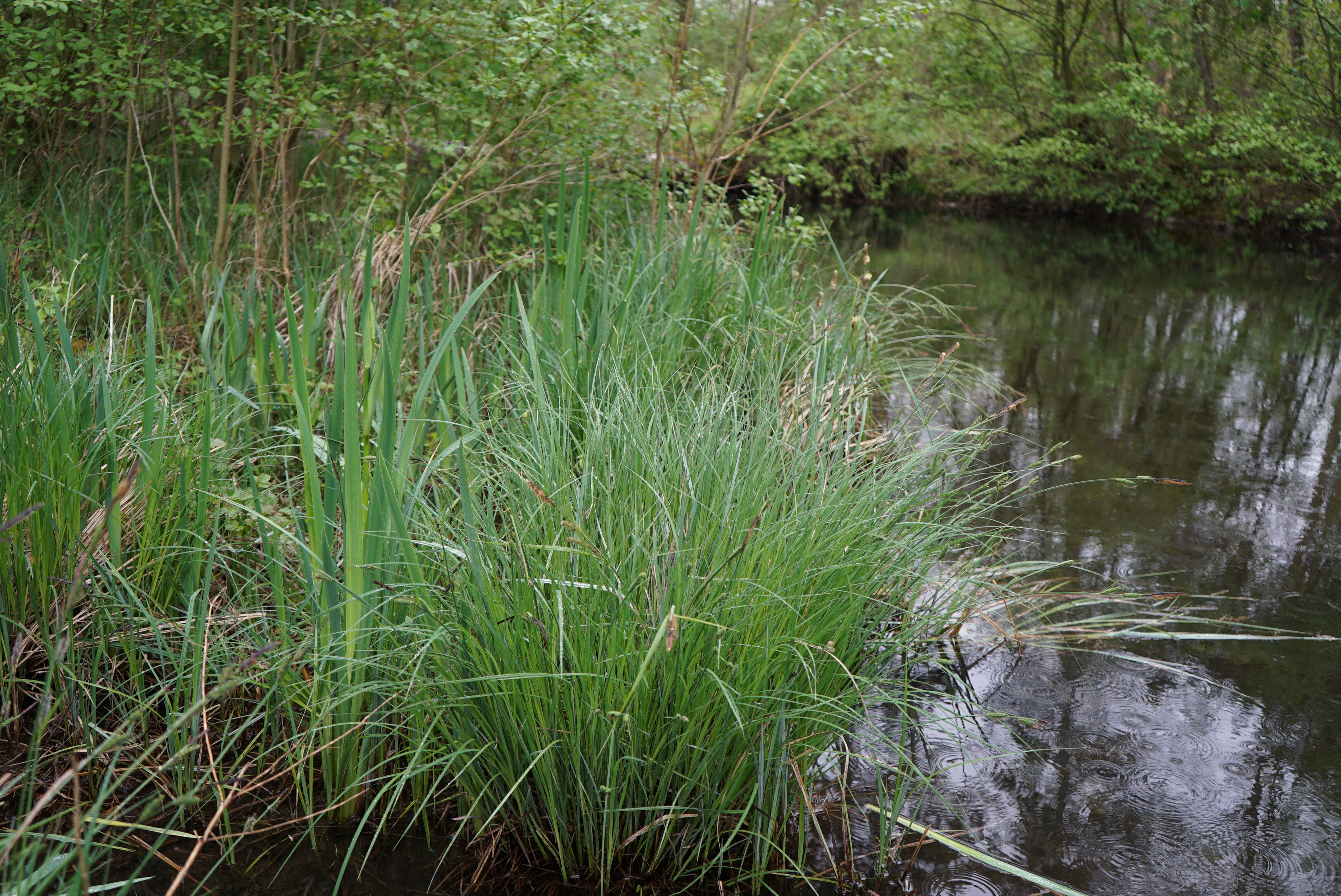 photo prise dans la "Réserve naturelle régionale du marais les trous de Leu".